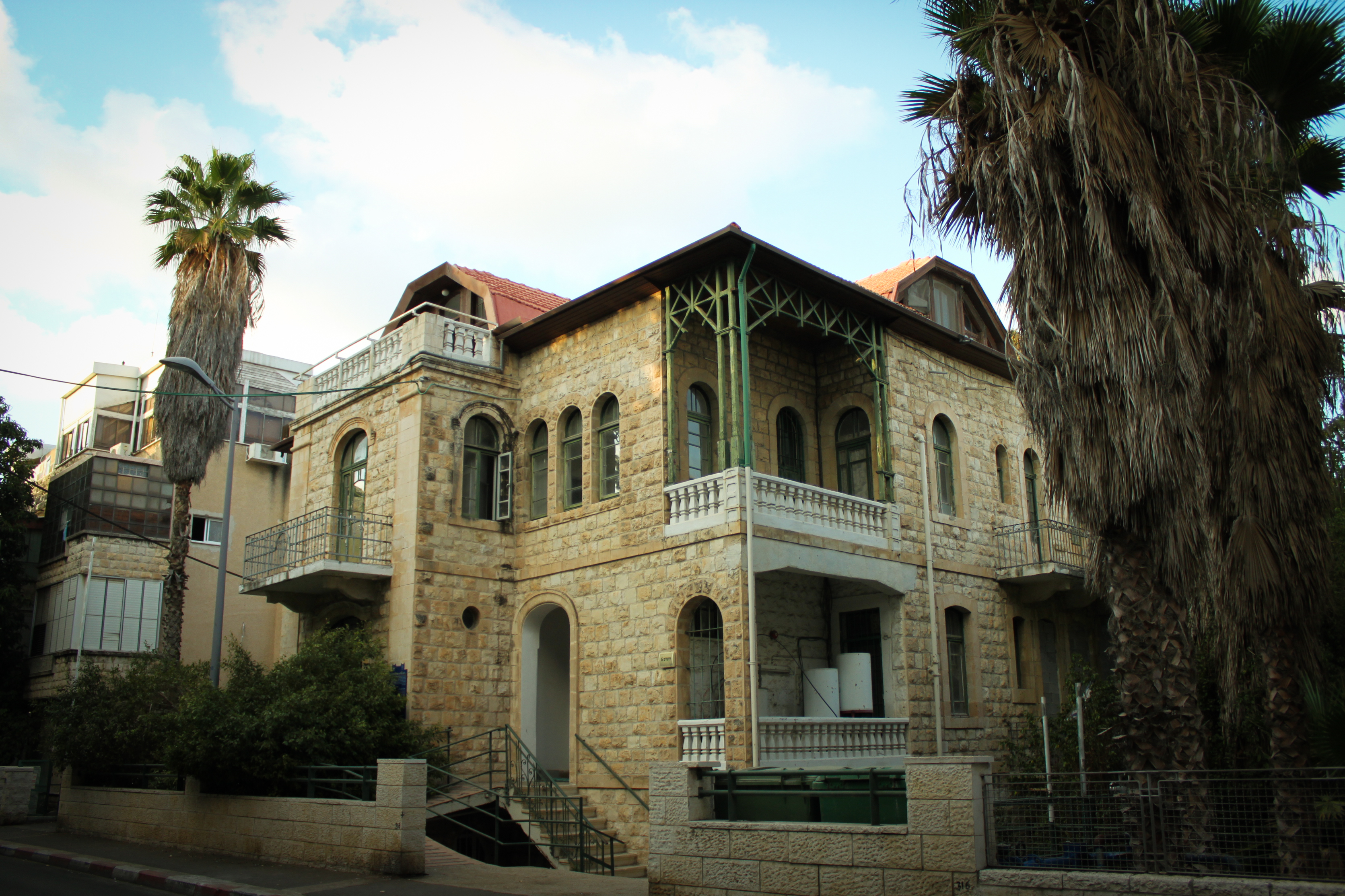 בית אליהו מזרחי, רח' ירושלים 5, חיפה